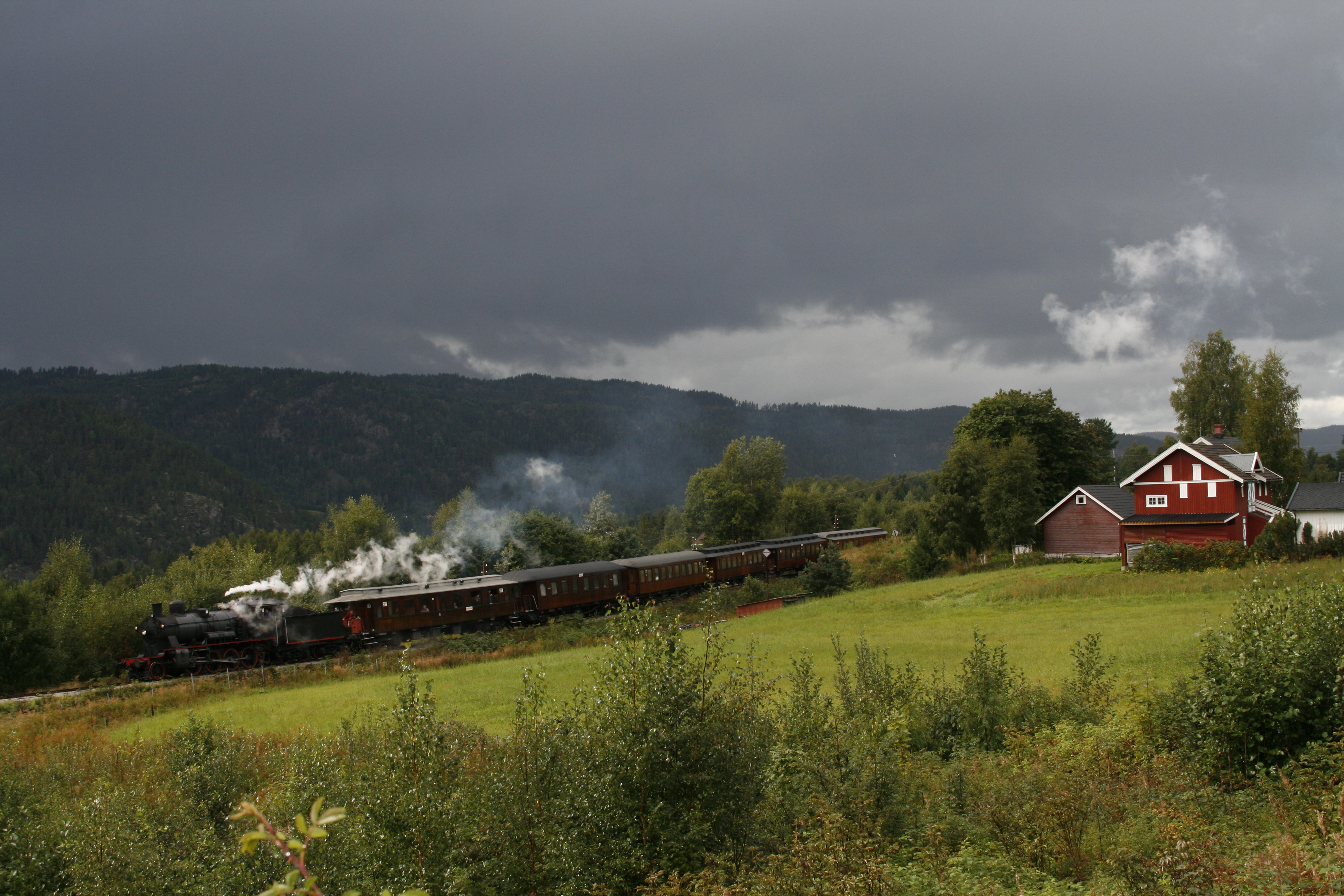 Krøderbanens tog på Snarum